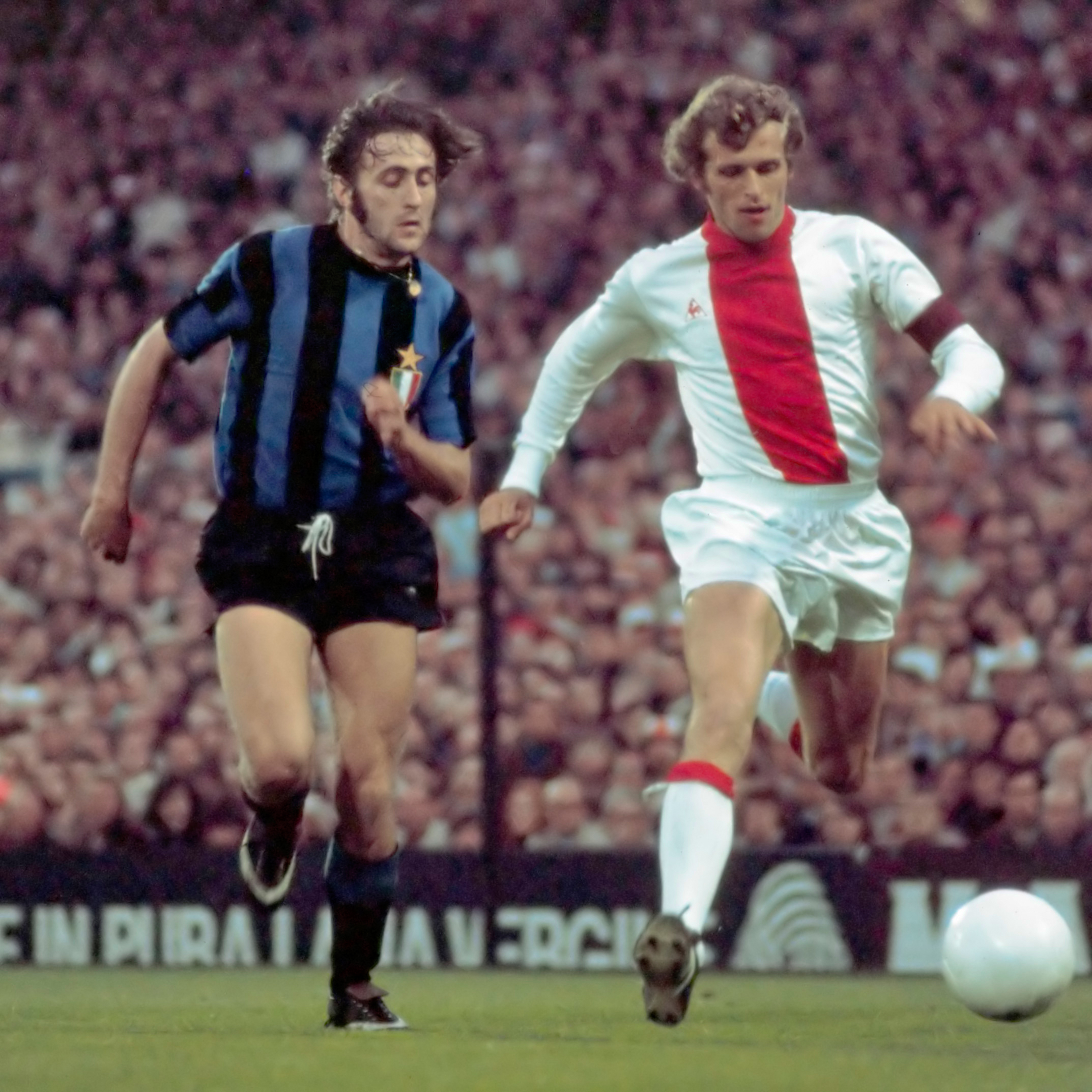 Rotterdam, 31 mei 1972, finale Europacup I in Feijenoord stadion: Ajax tegen FC Internazionale Milano 2-0; Mauro Bellugi (links) en Piet Keizer (rechts) in aktie.